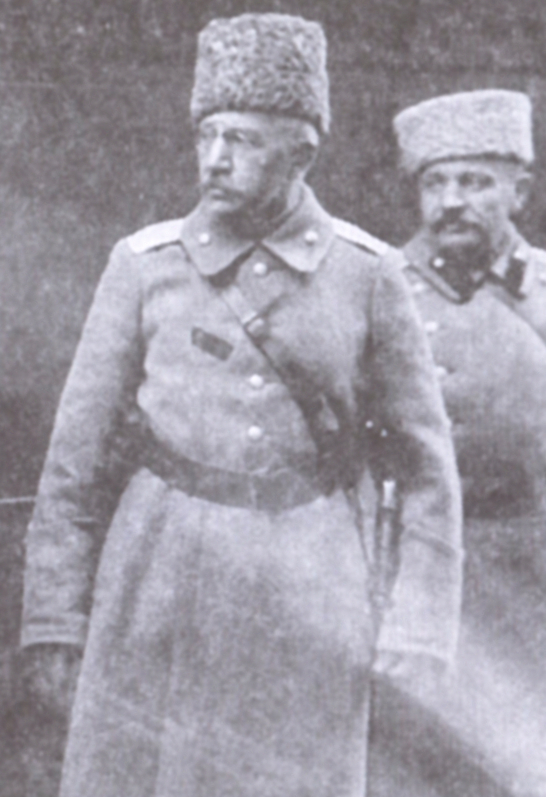 Командный состав Добровольческой армии: генералы А.П. Богаевский, А.И. Деникин, П.Н. Краснов. Станция Чир. 1918 г.